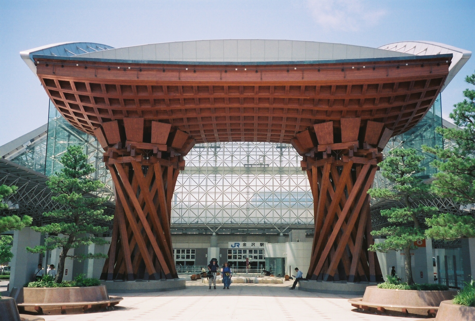 Entrada estilo "torii" a la estación de Kanazawa Kanazawa Station -- torii-style gate